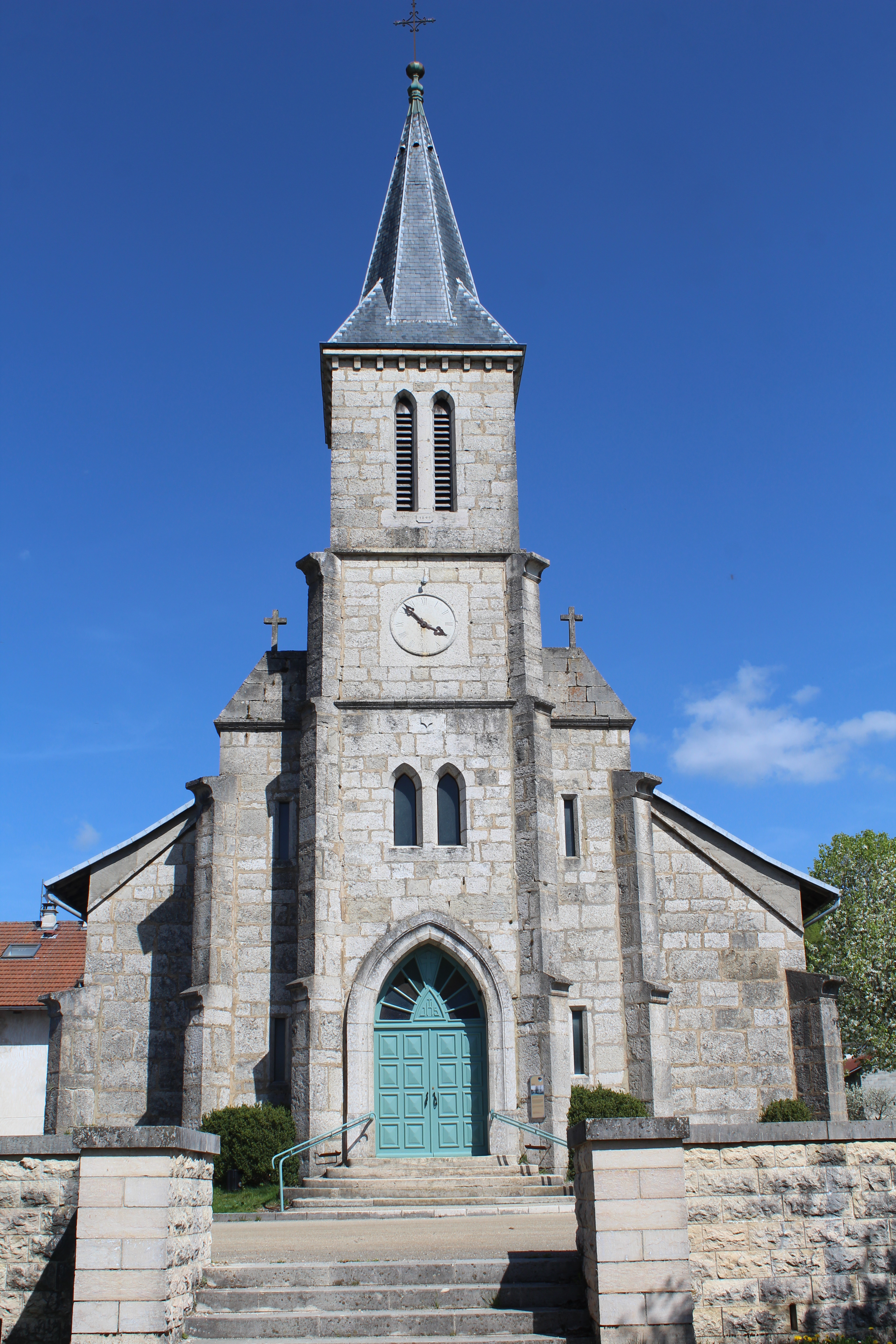 Église Saint-Paul d'Aranc.